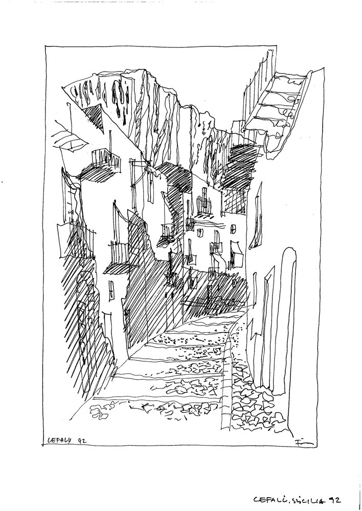 Cefalú, Szicília, Olaszország (útirajz)